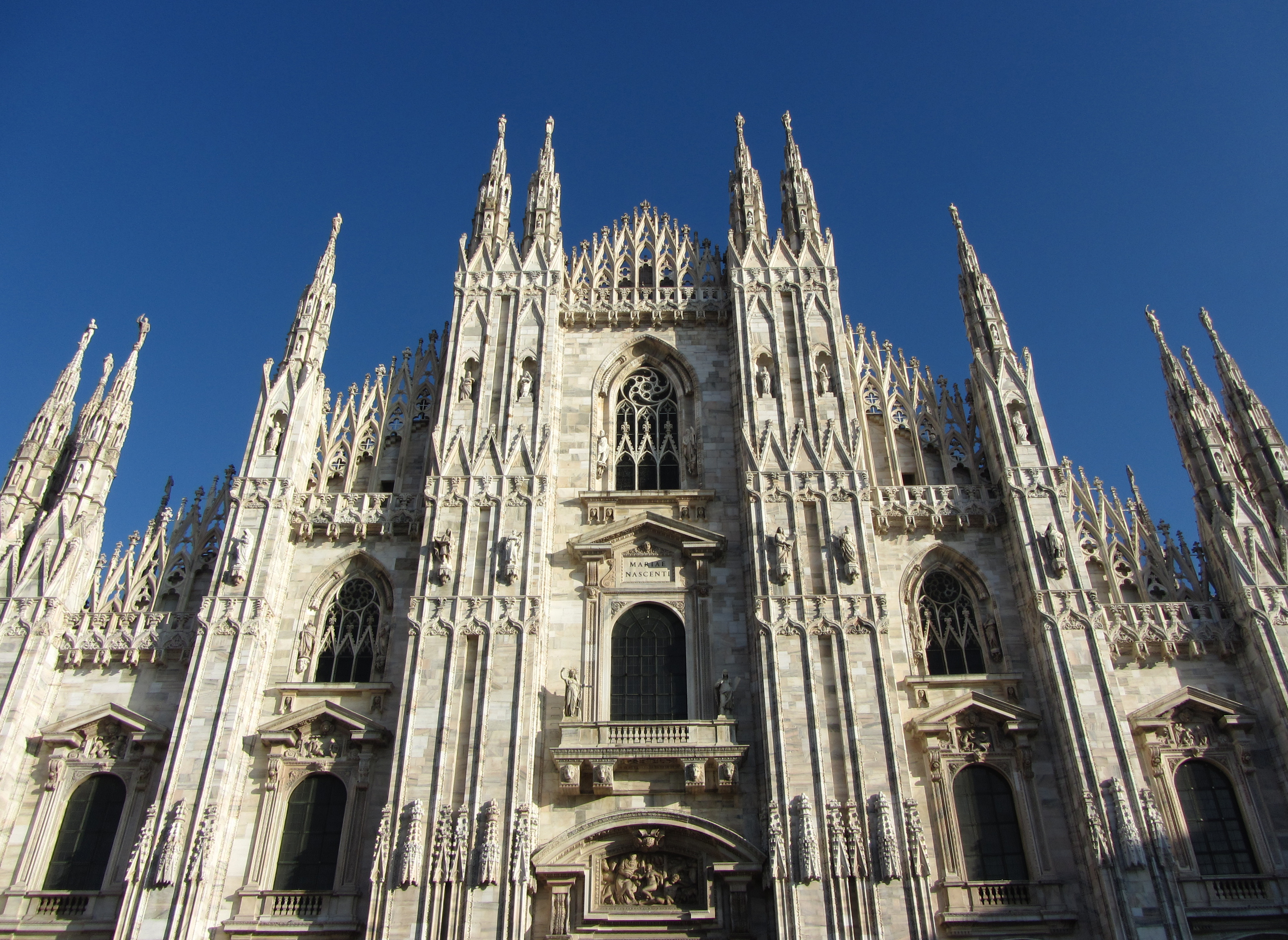 Duomo di Milano